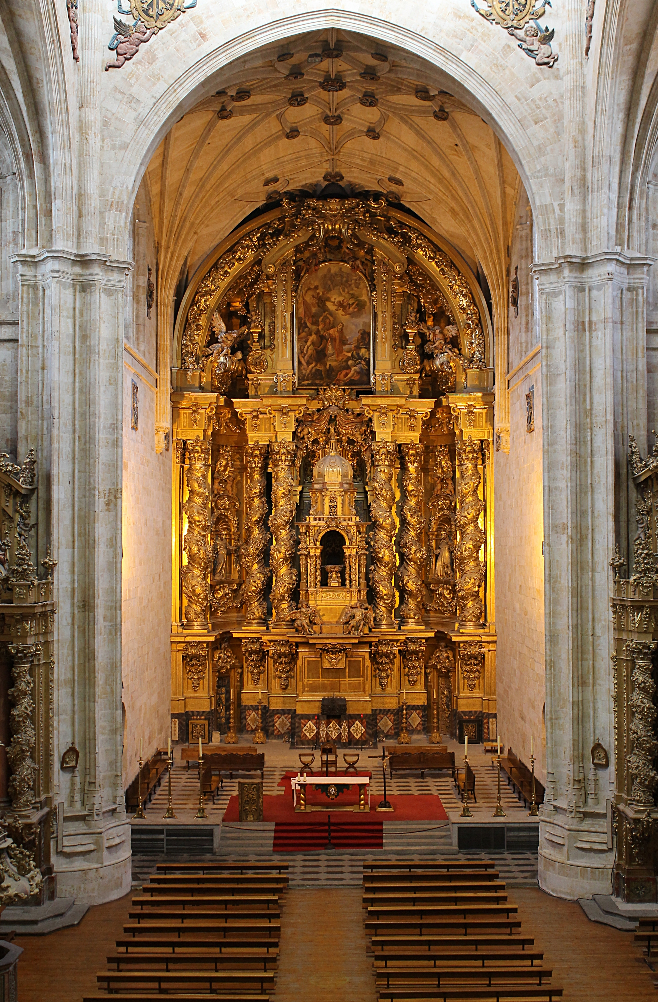 Retable de Churriguera dans le couvent de San Esteban. Depuis la promenade aérienne, on peut rejoindre le chœur de l'église et profiter d’une formidable vue d'ensemble.